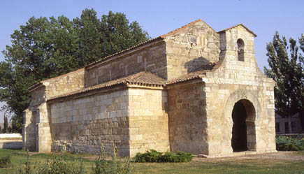 Iglesia de San Juan de Baños (Palencia). Autor: --Rafaelji 14:20 11 ene, 2005 (CET). Original en diapositiva de 35 mm. Categoría:España (imagen)